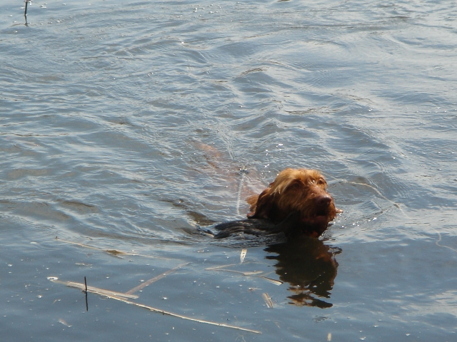 drótos vizsla vízi munka közben